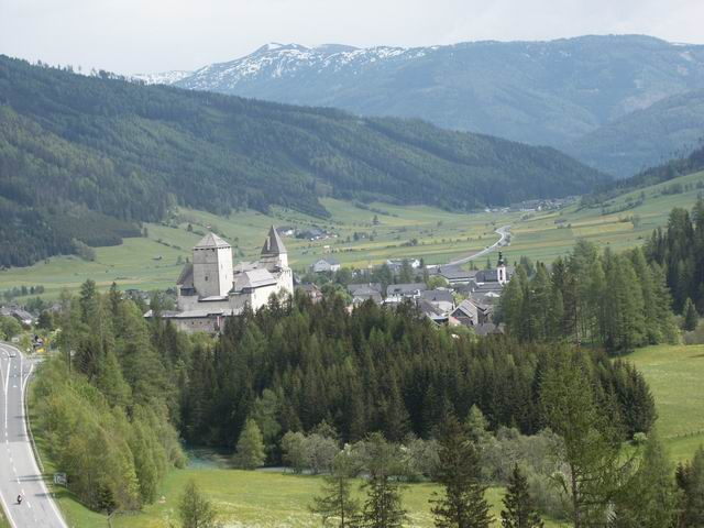 Blick auf die Burg Mauterndorf von Nord-Westen aus, selbstfotografiert, gemeinfrei